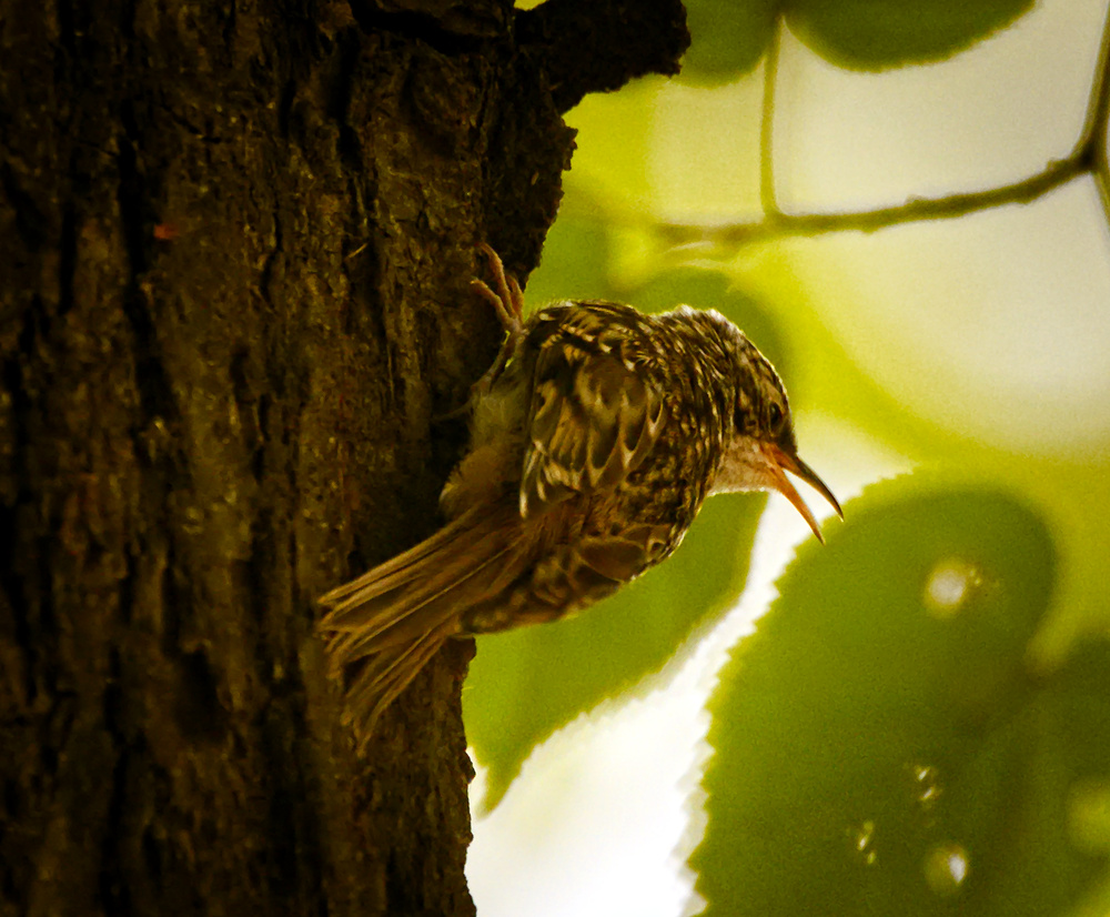 Juvenile short-toed treecreeper (Certhia brachydactyla) on a tree trunk, calling its parent. Młody pełzacz ogrodowy (Certhia brachydactyla) na pniu drzewa, nawołujący swojego rodzica.